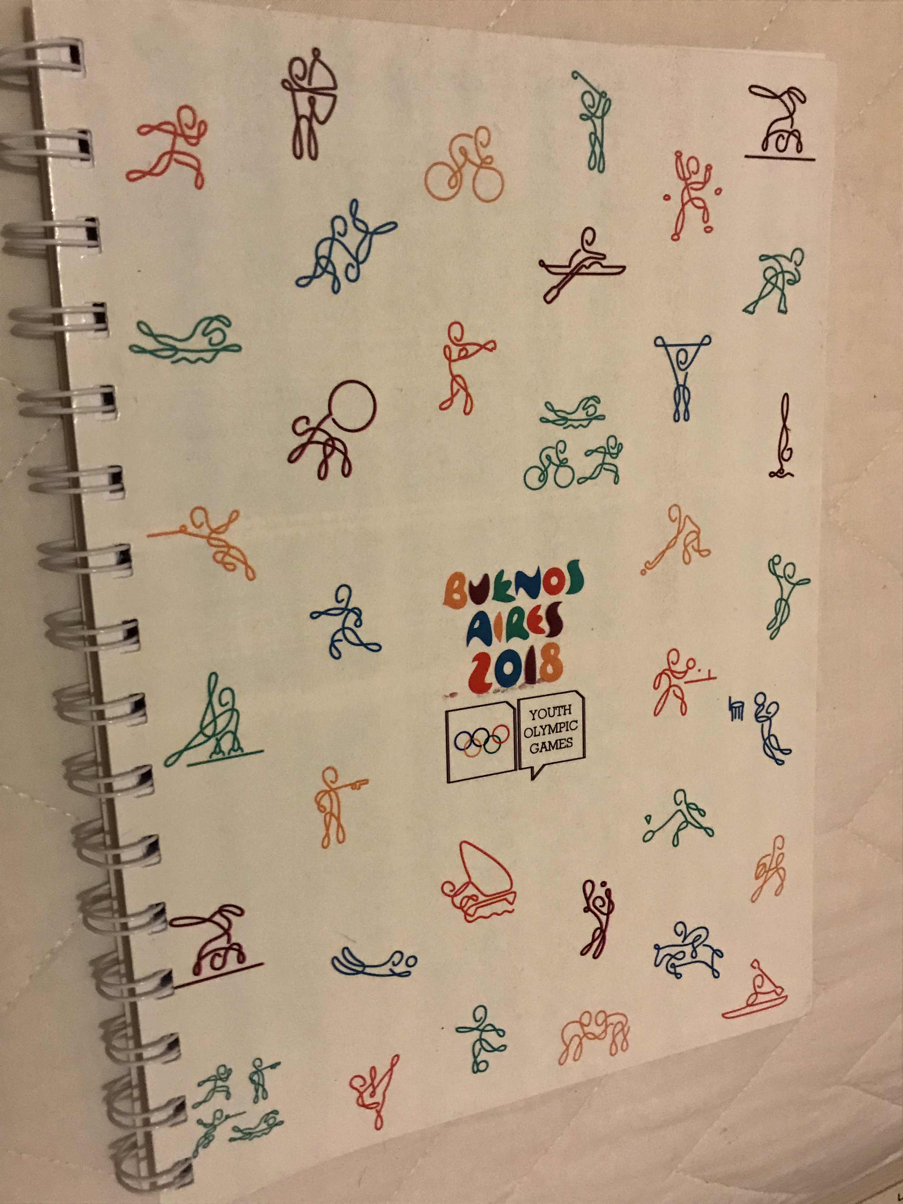 Cahier des Jeux olympiques de la jeunesse de 2018, représentant mes 34 pictogrammes officiels